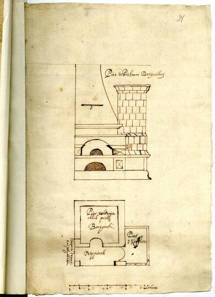 Беларуская (тарашкевіца): Барысаў (Barysaŭ). Разны іканастас у царкве